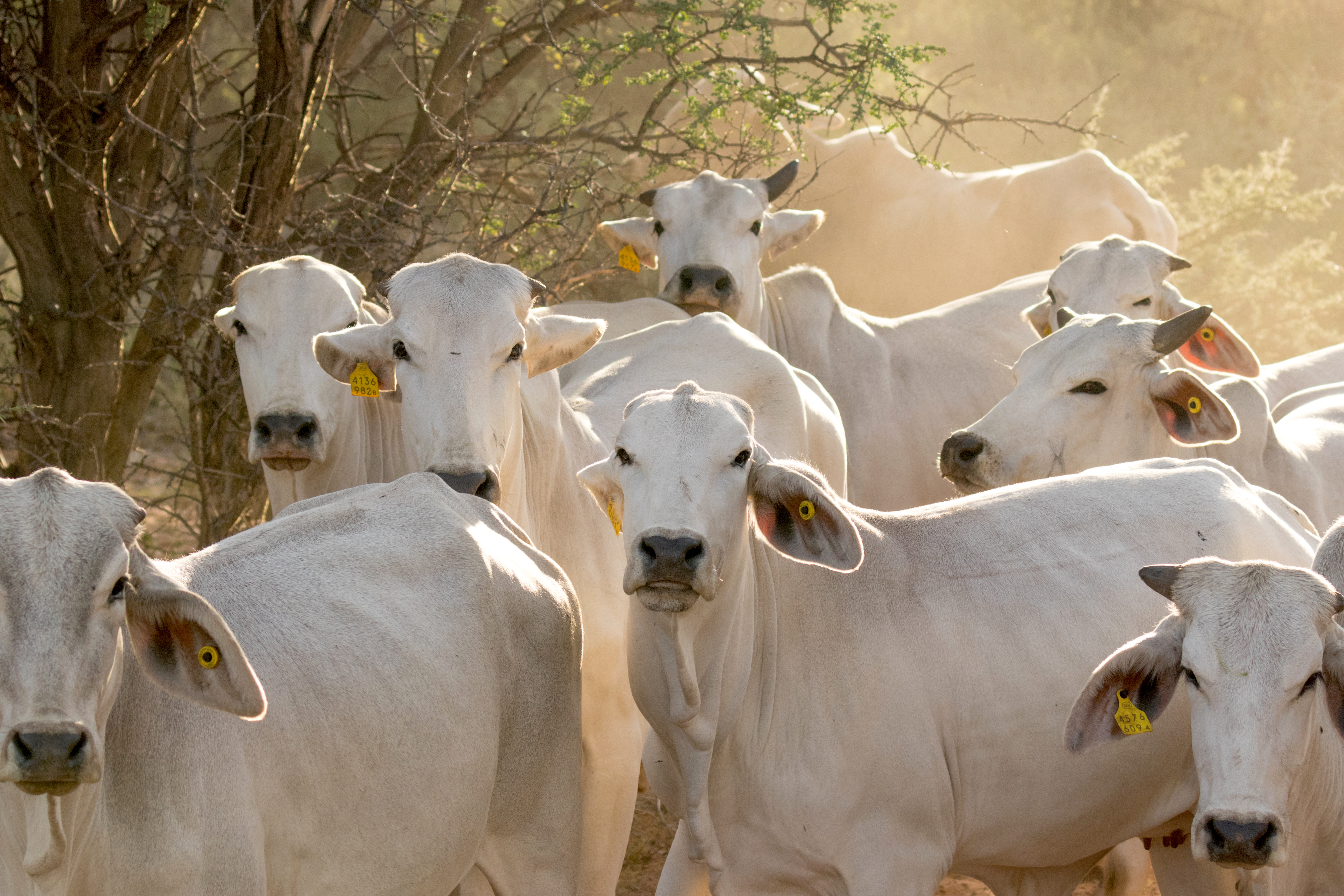 Brahman-Herde, Namibia Farm Neuhof